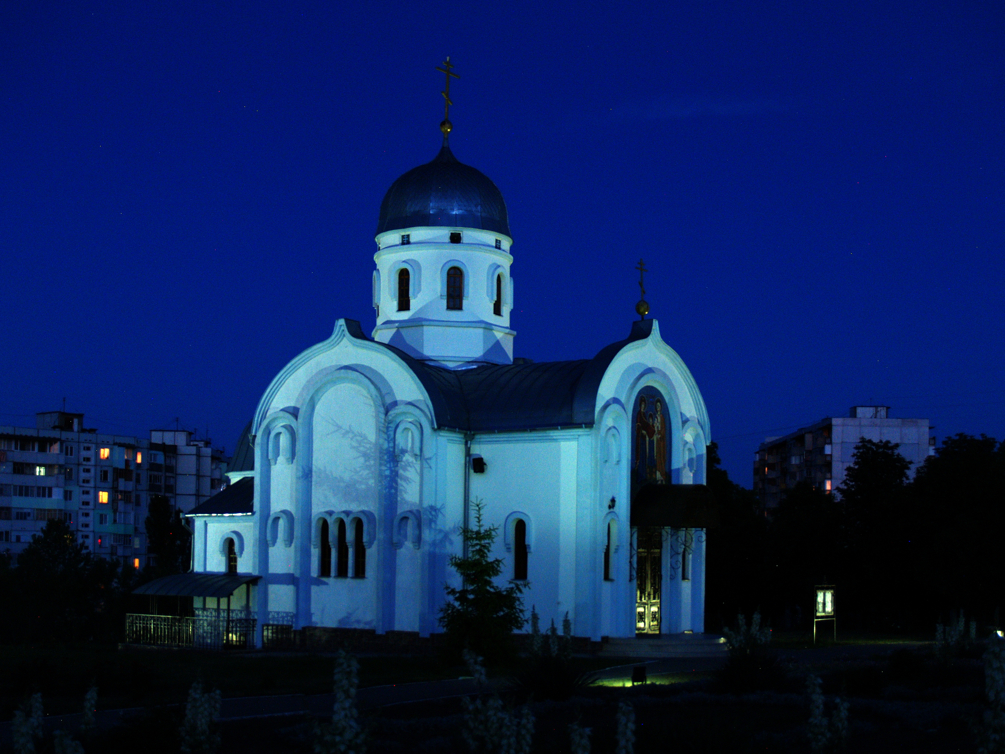 Храм Свв. Богоотец Иоакима И Анны